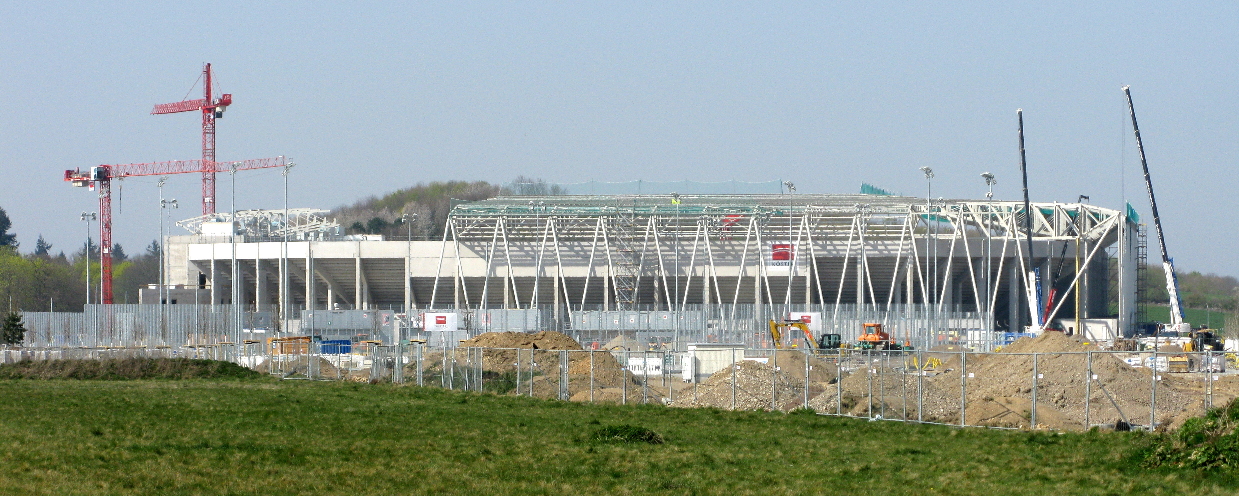 Neubau eines Fußballstadions für den Sportclub Freiburg